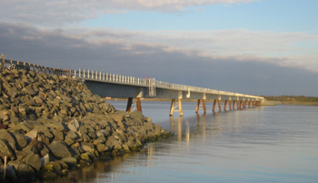 Kråkvågbrua mellom øyene Storfosna og Kråkvåg i Ørland (Bridge between islands Kråkvåg and Storfosna in Ørland, Sør-Trøndelag, Norway)